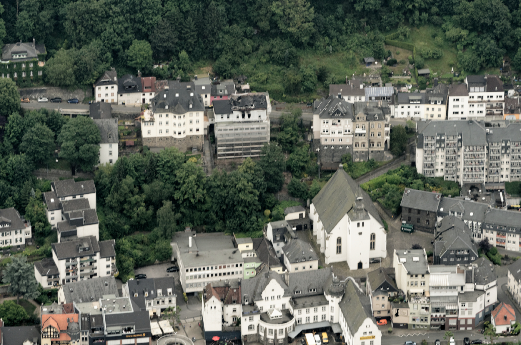 Fotoflug Sauerland Nord. Altena, Freiheit mit Lutherkirche The making of this document was supported by the Community-Budget of Wikimedia Germany.